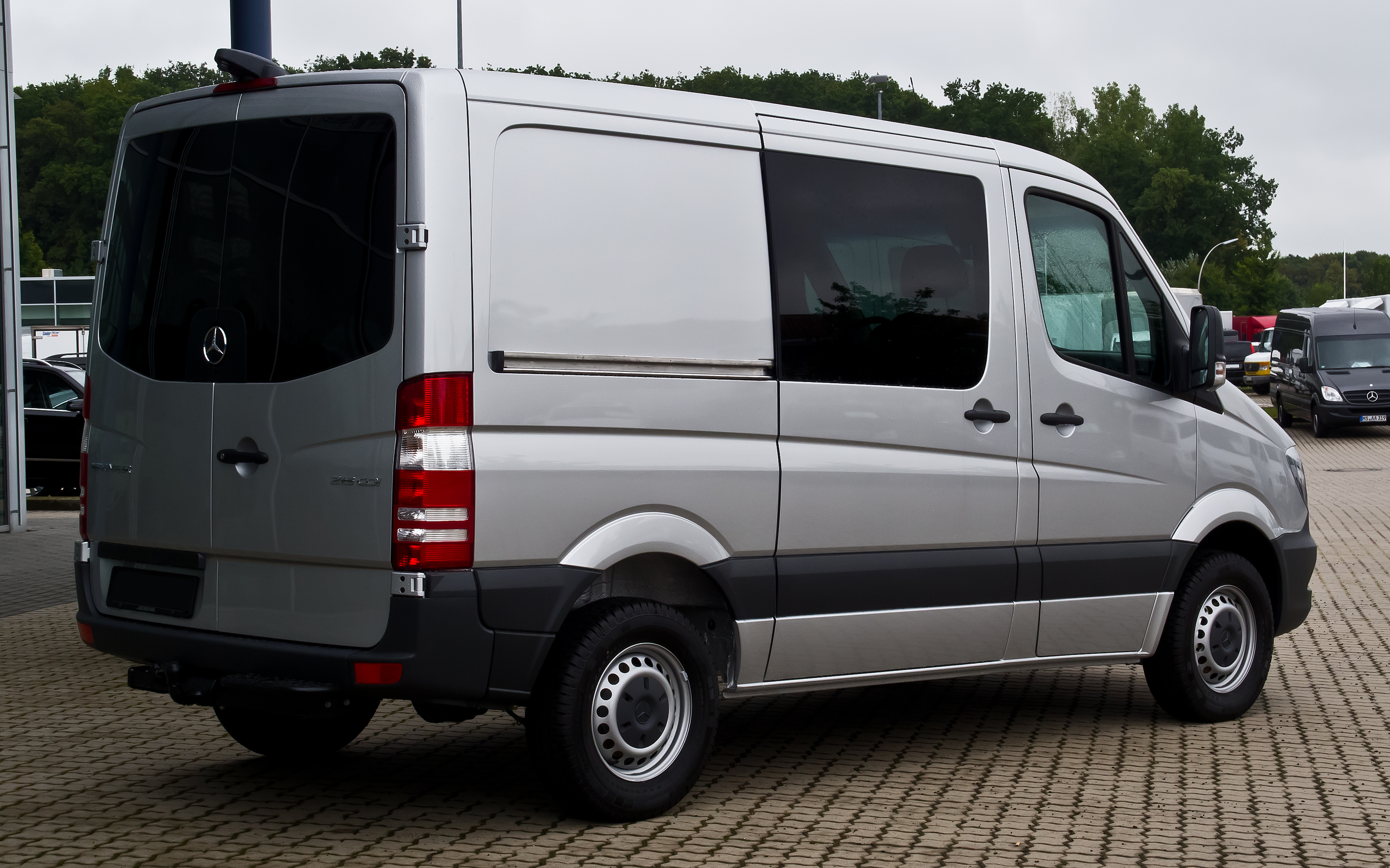 Mercedes-Benz Sprinter Mixto 216 CDI (W 906, Facelift)